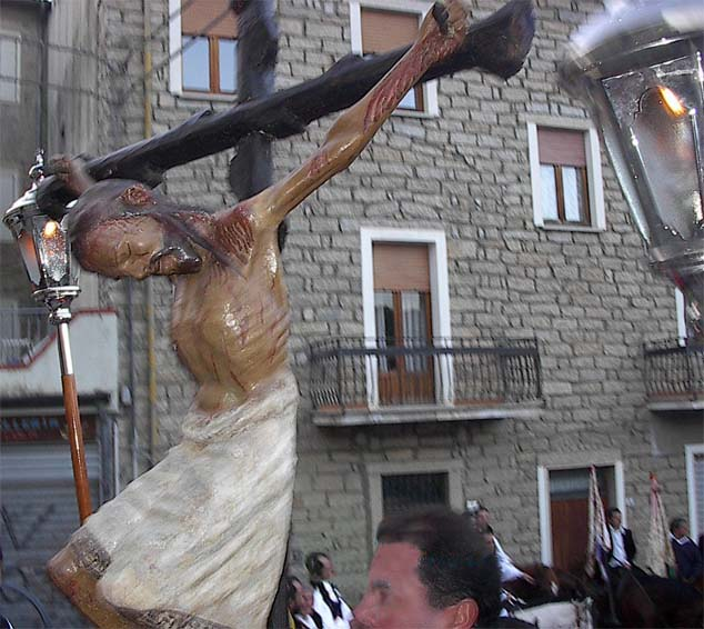 Crocifisso ligneo del 1400